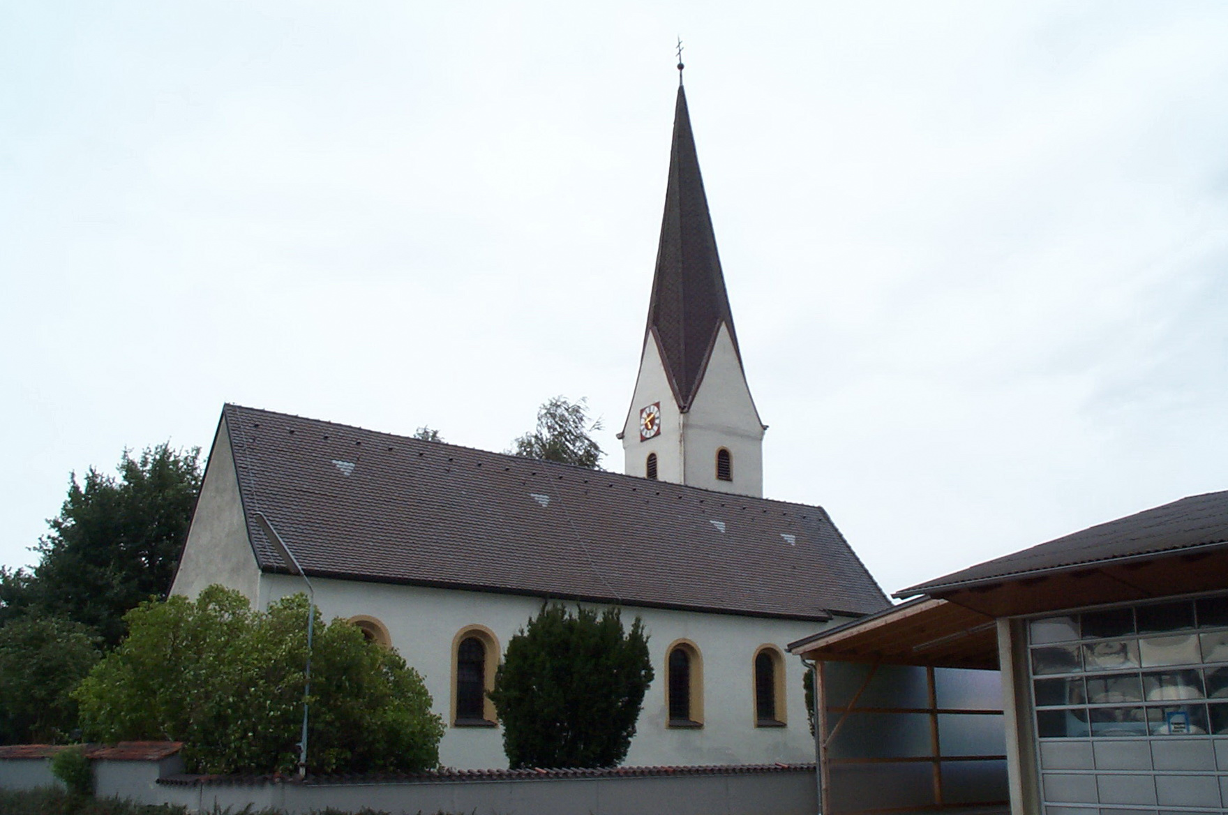 Pfellkofen. Katholische Filialkirche Mater Dolorosa, Saalbau mit eingezogenem Chor und Flankenturm mit Spitzdach, Langhaus wohl 14. Jahrhundert, Chor und Turm um 1500, 1866 nach Westen verlängert; Friedhofsmauer, teilweise mit Nischen, Bruchstein, wohl 17. Jahrhundert, mit Grabsteinen des 19. Jahrhunderts